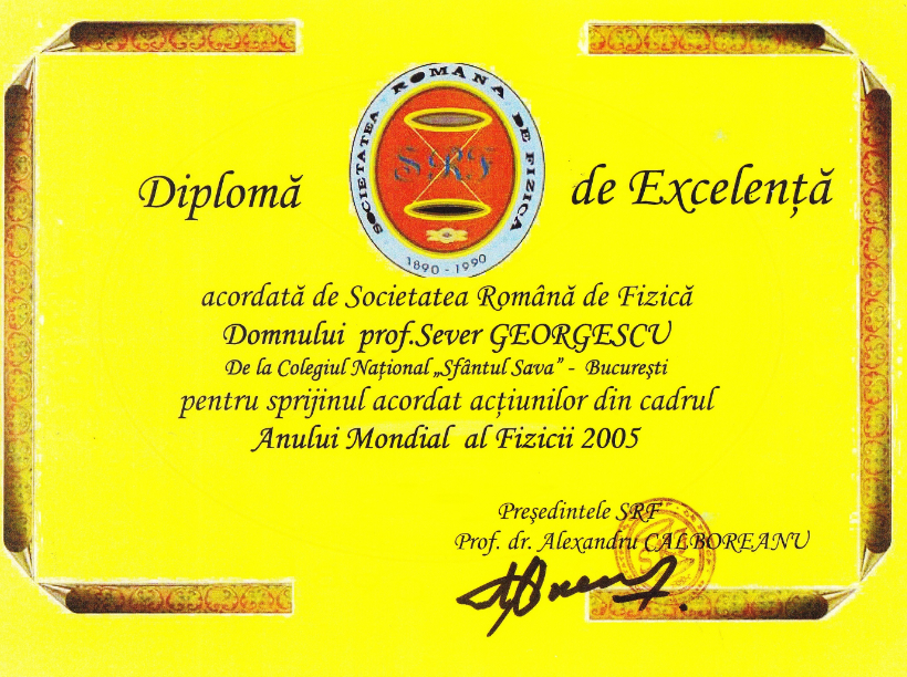 Diplomă acordată de Societatea Română de Fizică profesorului S. I. Georgescu.